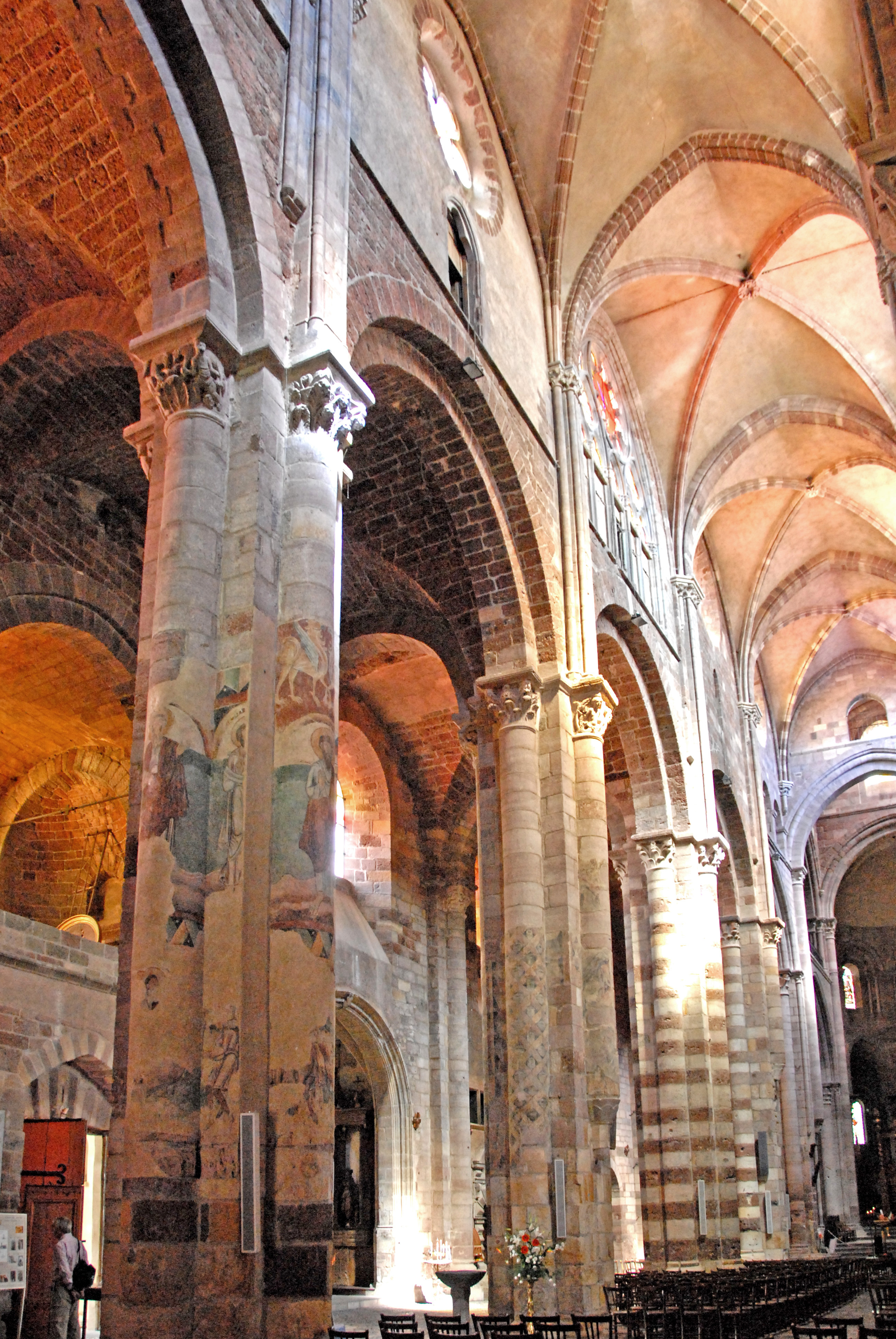 Sain-Julien Brioude, Mittelschiff,NO-Wand